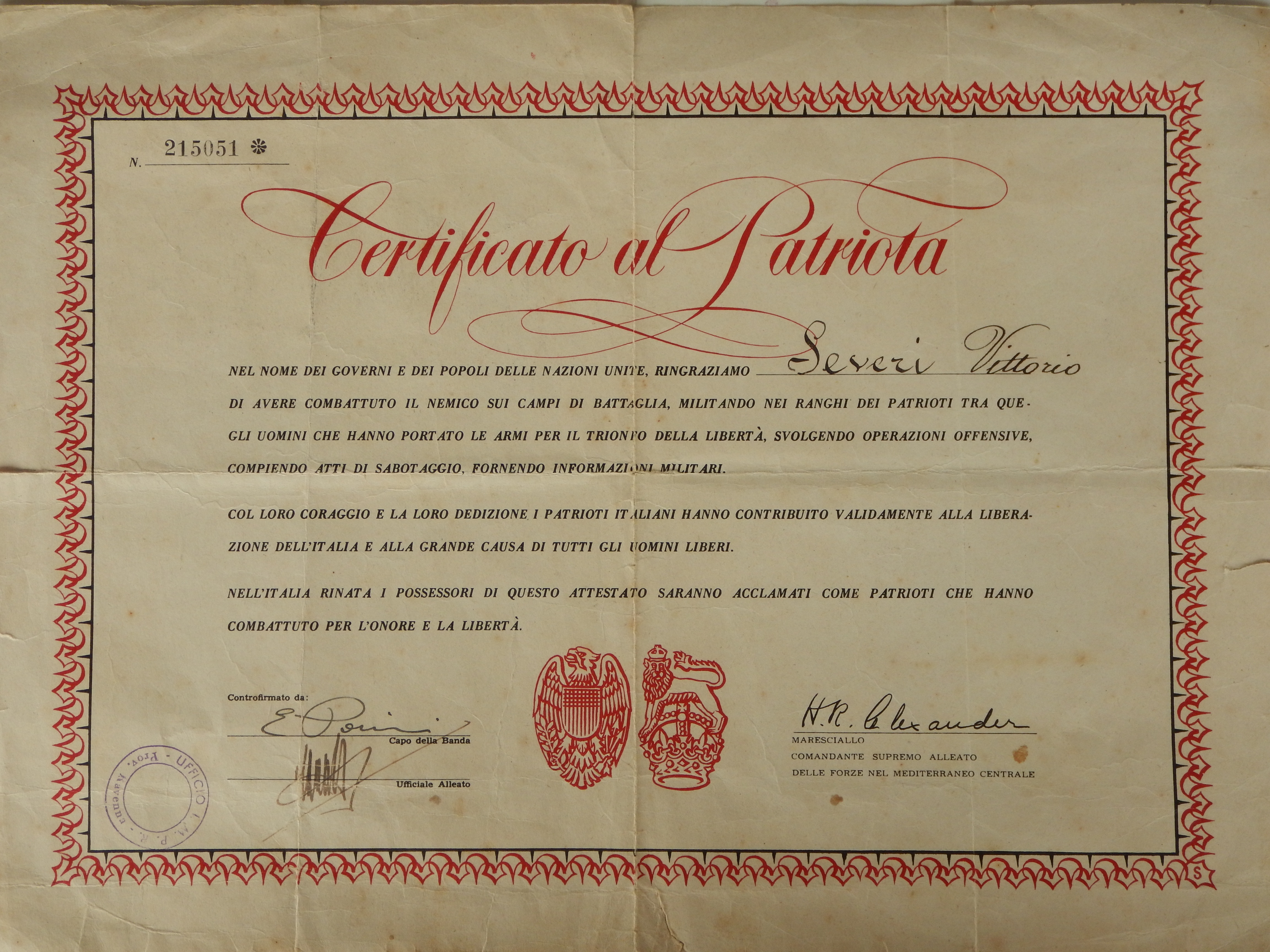 Certificado ao Patriota conferido aos membros da resistencia italiana pelo general ingles H.R.Alexander, comandante das forças aliadas no Mediteraneo.